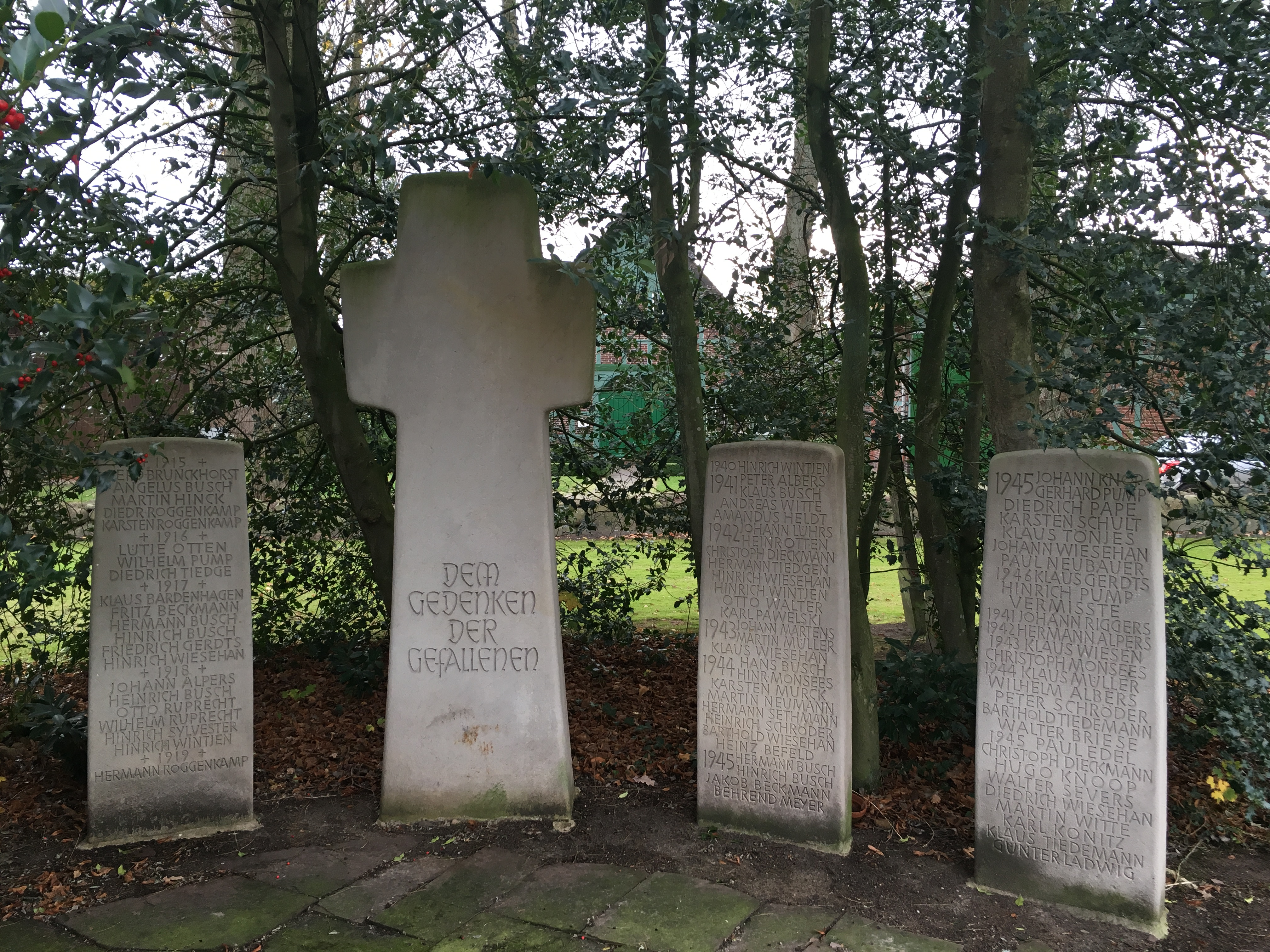 Denkmaal för de Fullenen ut den Eersten un Tweten Weltkrieg bi de Gangolf-Kark in Örel